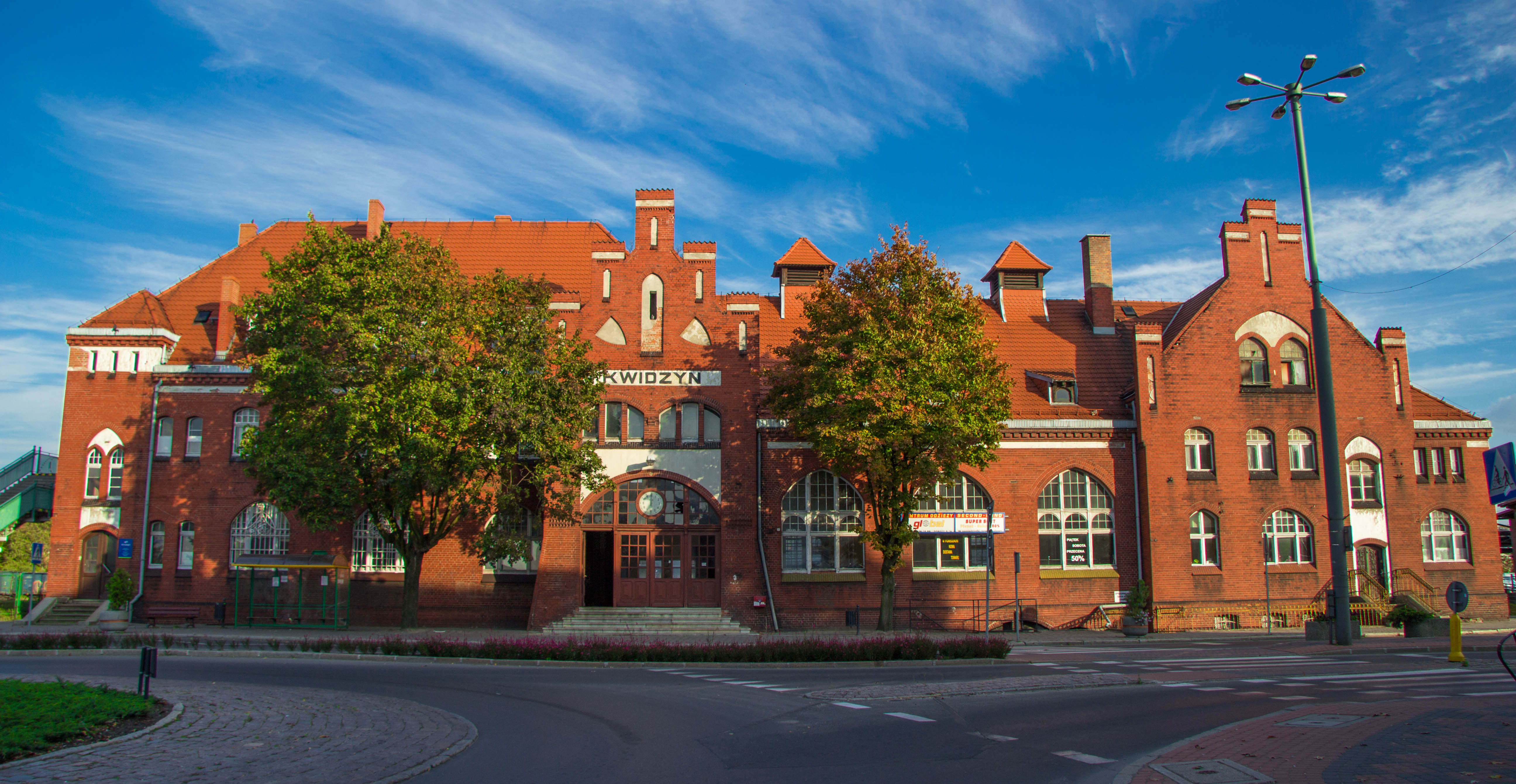 Kwidzyn, ul. Kościuszki 54 - dworzec kolejowy (zabytek nr 1240 i 102/87 z 1.08.1988)